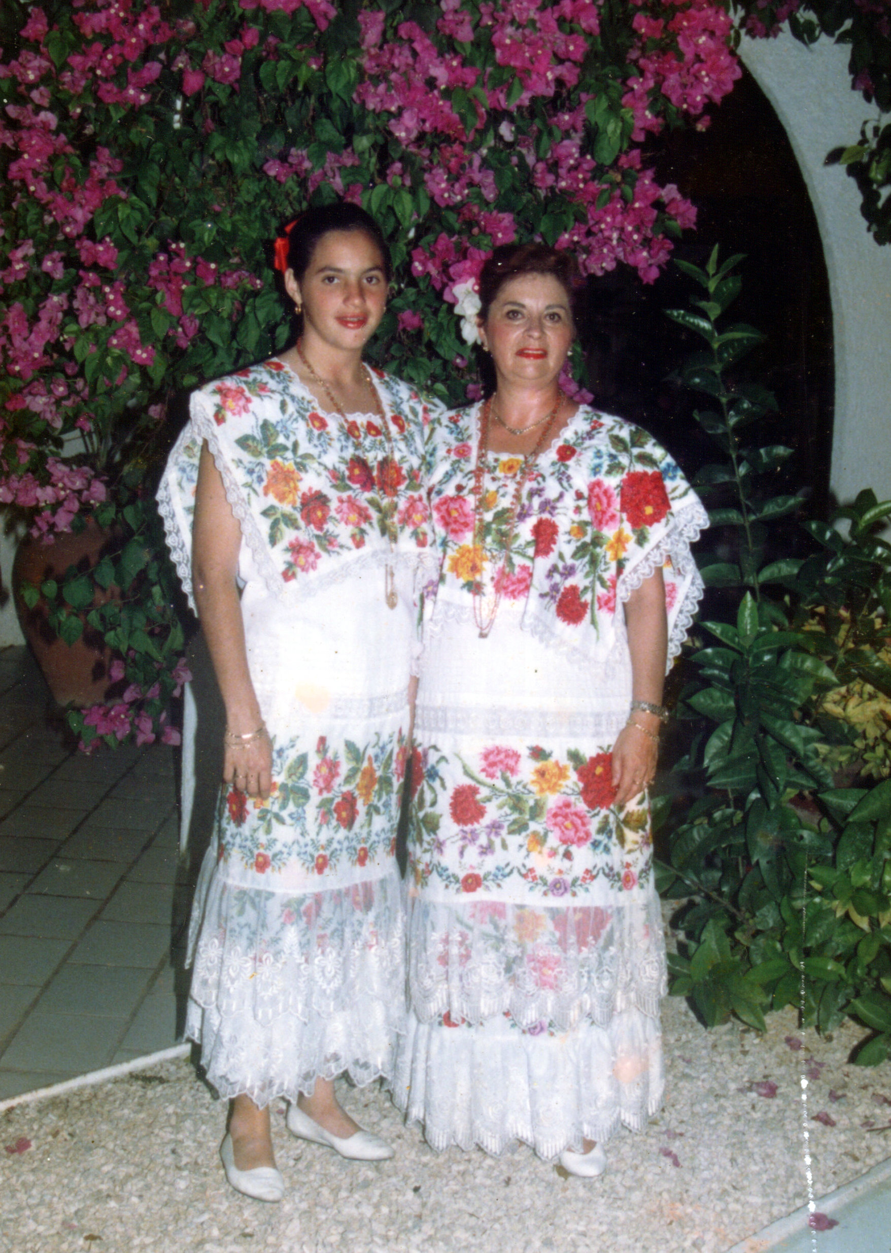 Fotografía de J y F en traje típico de yucatecas.